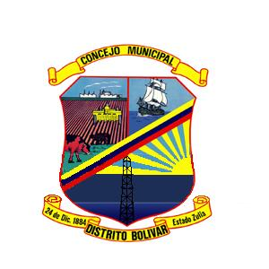 Escudo del Distrito Bolívar del estado Zulia 1884–1989